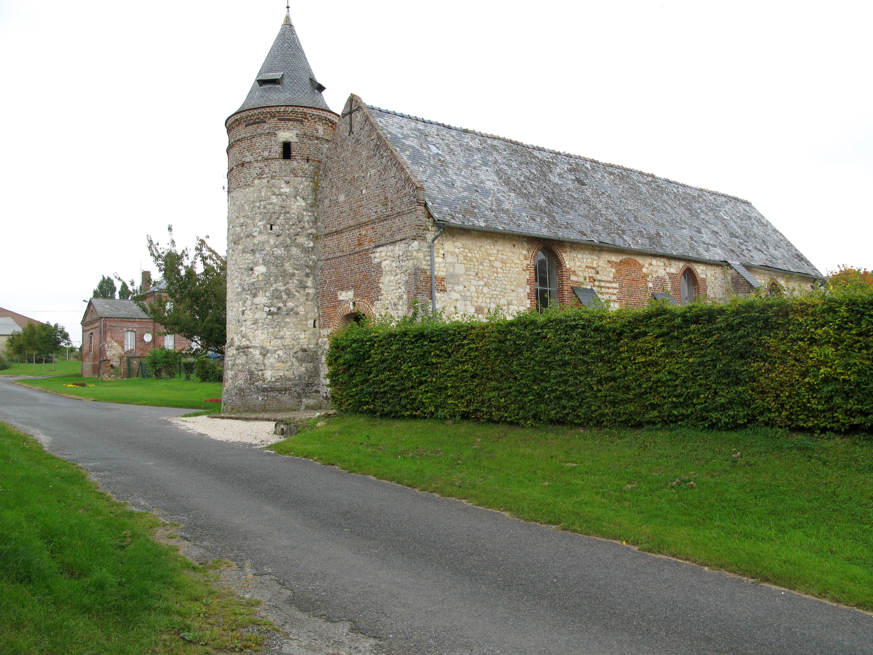 Houry (Aisne, France) - L'église fortifiée et la haie entourant le cimetière.